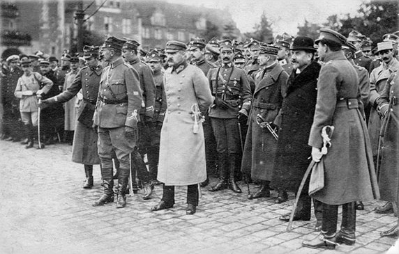 Józef Piłsudski in Poznań.